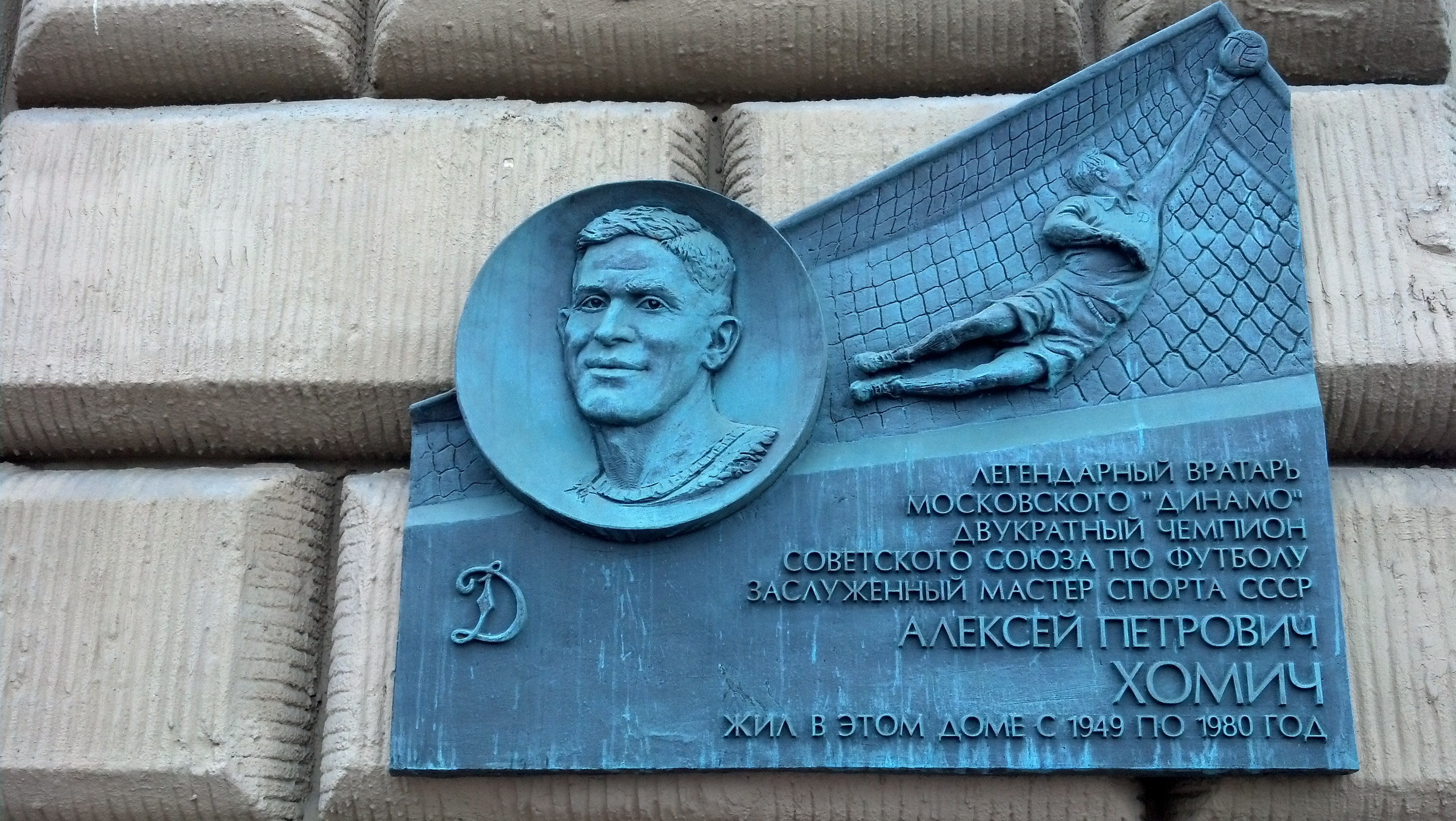 Алексе́й Петро́вич Хо́мич — советский футбольный вратарь.